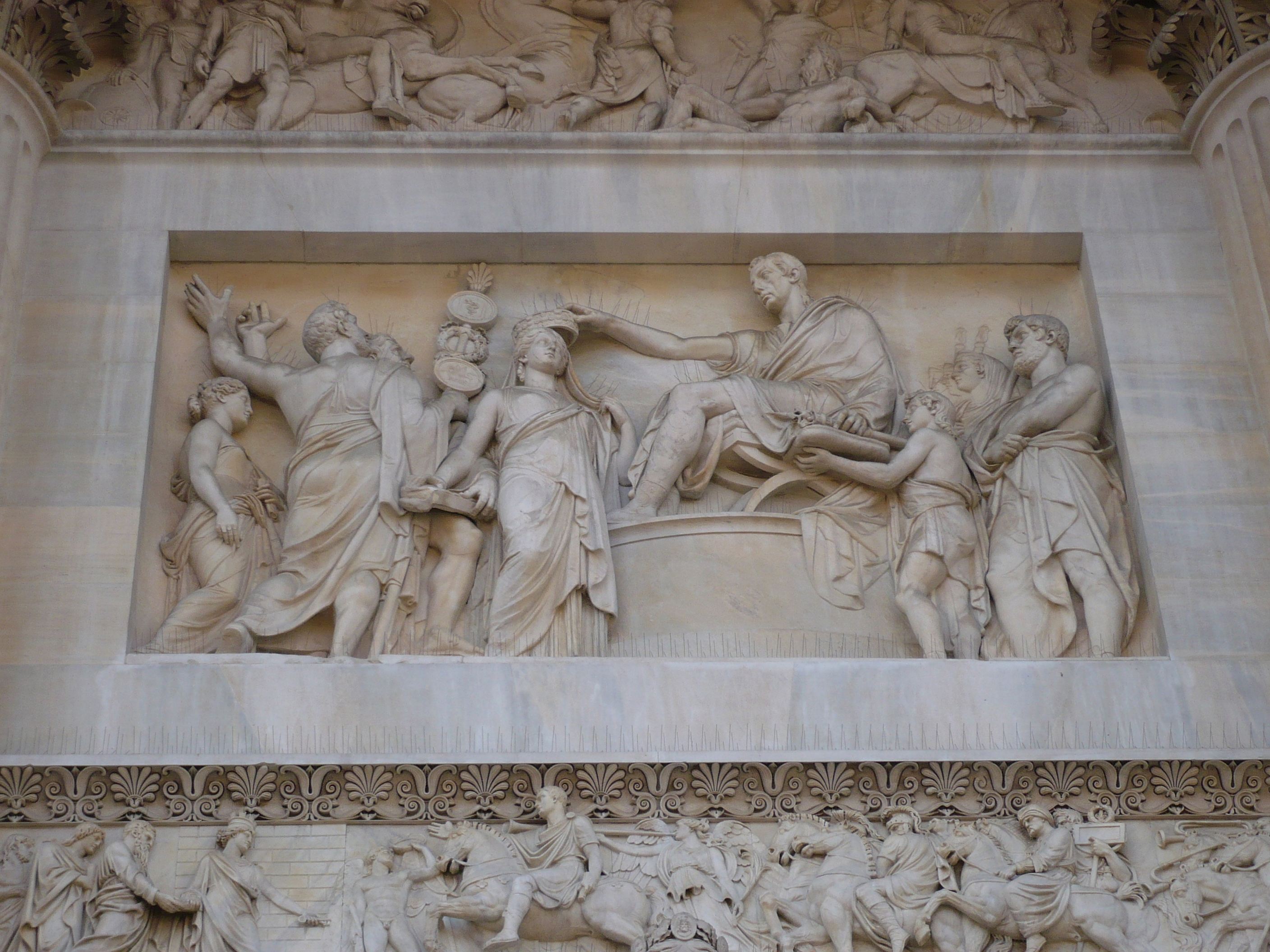 Arco della Pace, detail. L'imperatore Ferdinando I d'Austria incorona una figura allegorica.